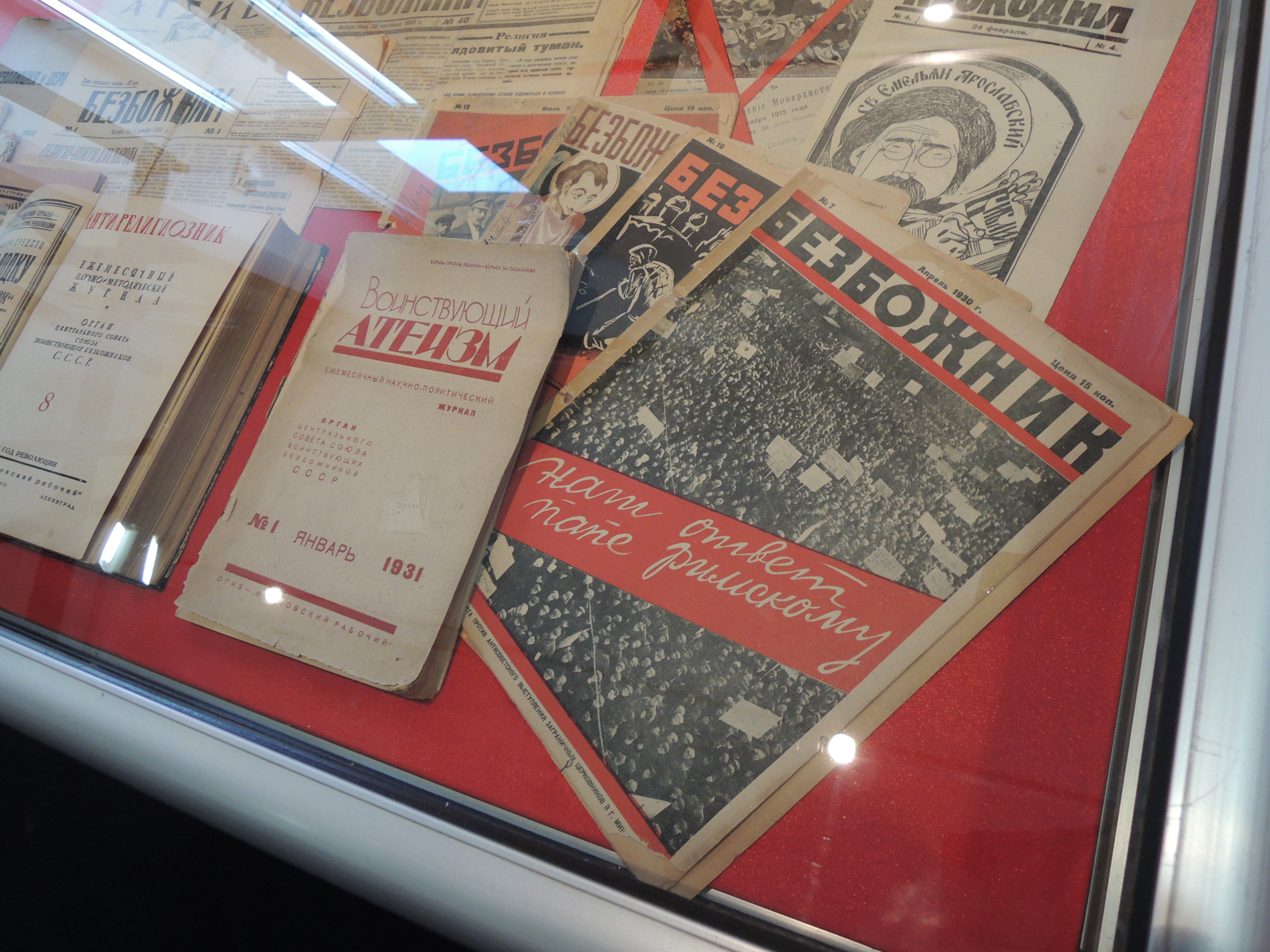 Выставка «Преодоление: Русская Церковь и Советская власть» в Государственном центральном музее современной истории России в Москве, 2012